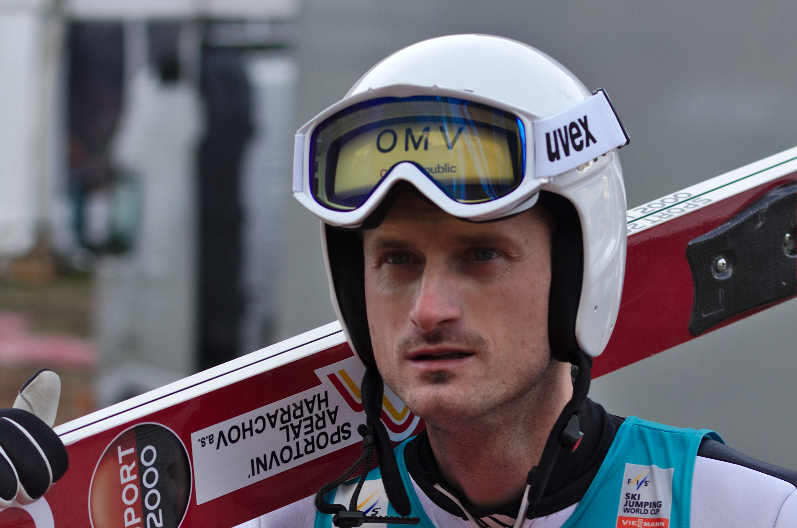 FIS Ski Jumping World Cup 2014 - Engelberg - 20141221 - Jakub Janda